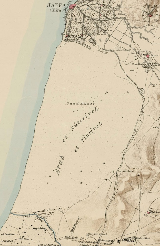 הדיונה הגדולה שכיום נמצאות עליה ראשלצ, בת-ים וחולון